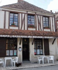 Facade de l'auberge du relais